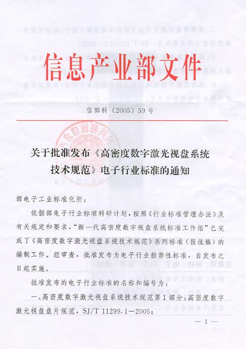 中國信息產業部發佈《高密度數字雷射視盤系統技術規範》電子行業標準通知。 來源：北京阜國數字技術有限公司官方網站。